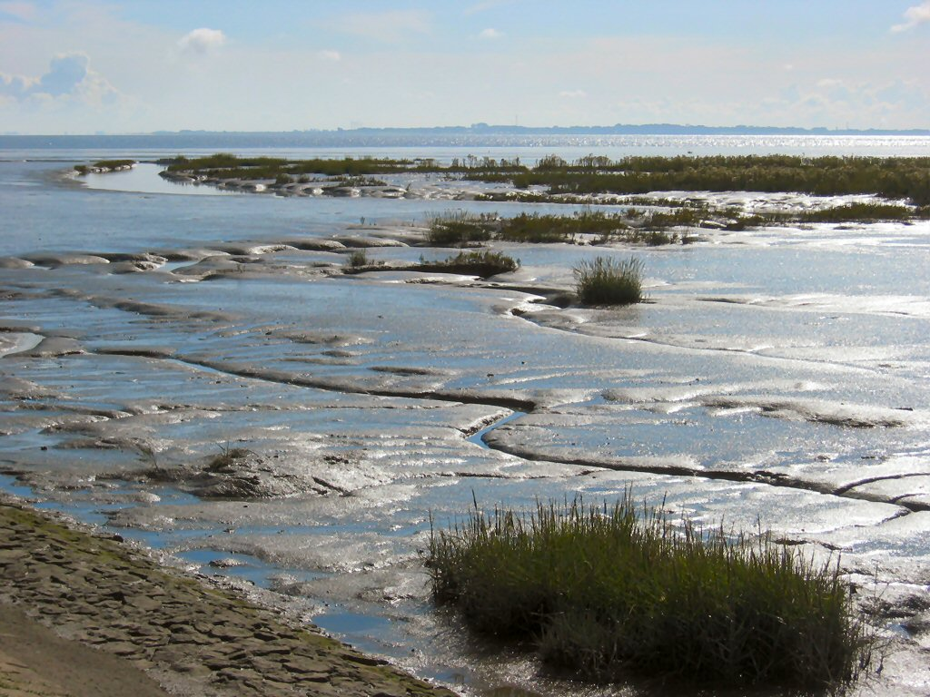 Wilhelmshaven, Wattgebiet bei Mariensiel